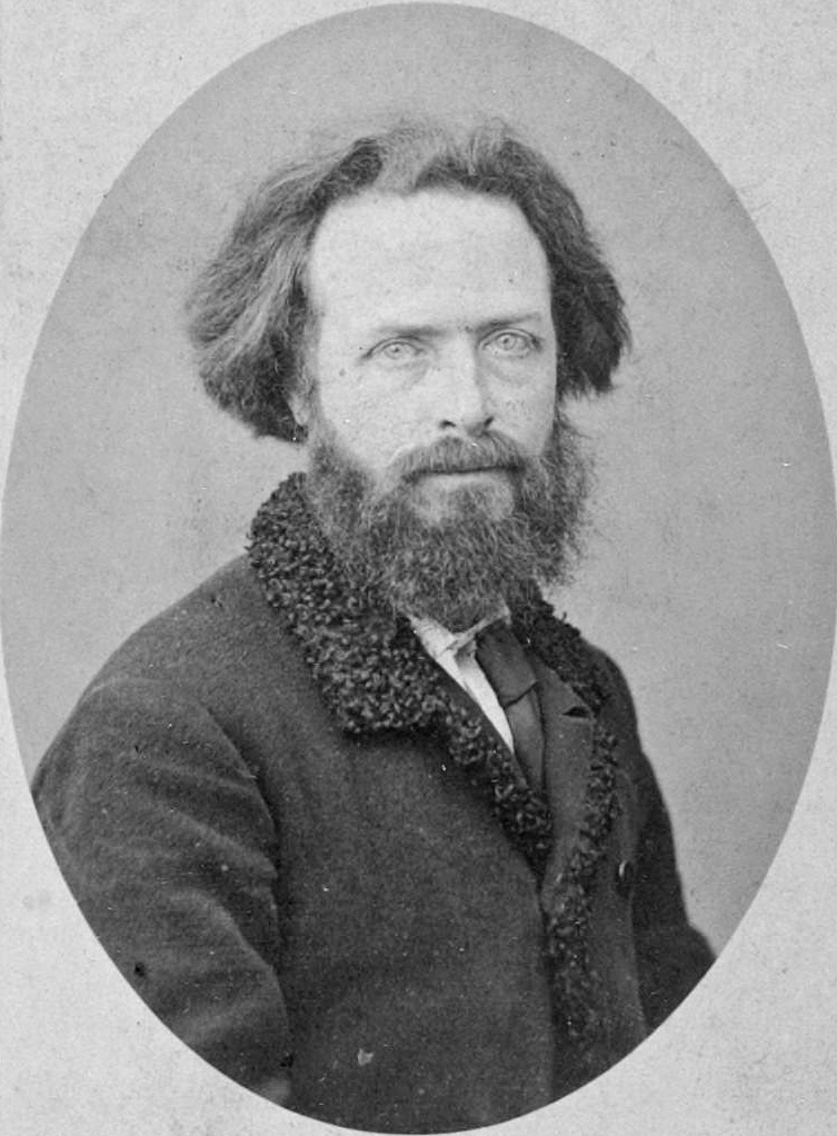 Élisée Reclus, né à Sainte-Foy-la-Grande (Gironde) le 15 mars 1830 et mort à Torhout en Belgique le 4 juillet 1905, est un géographe libertaire.